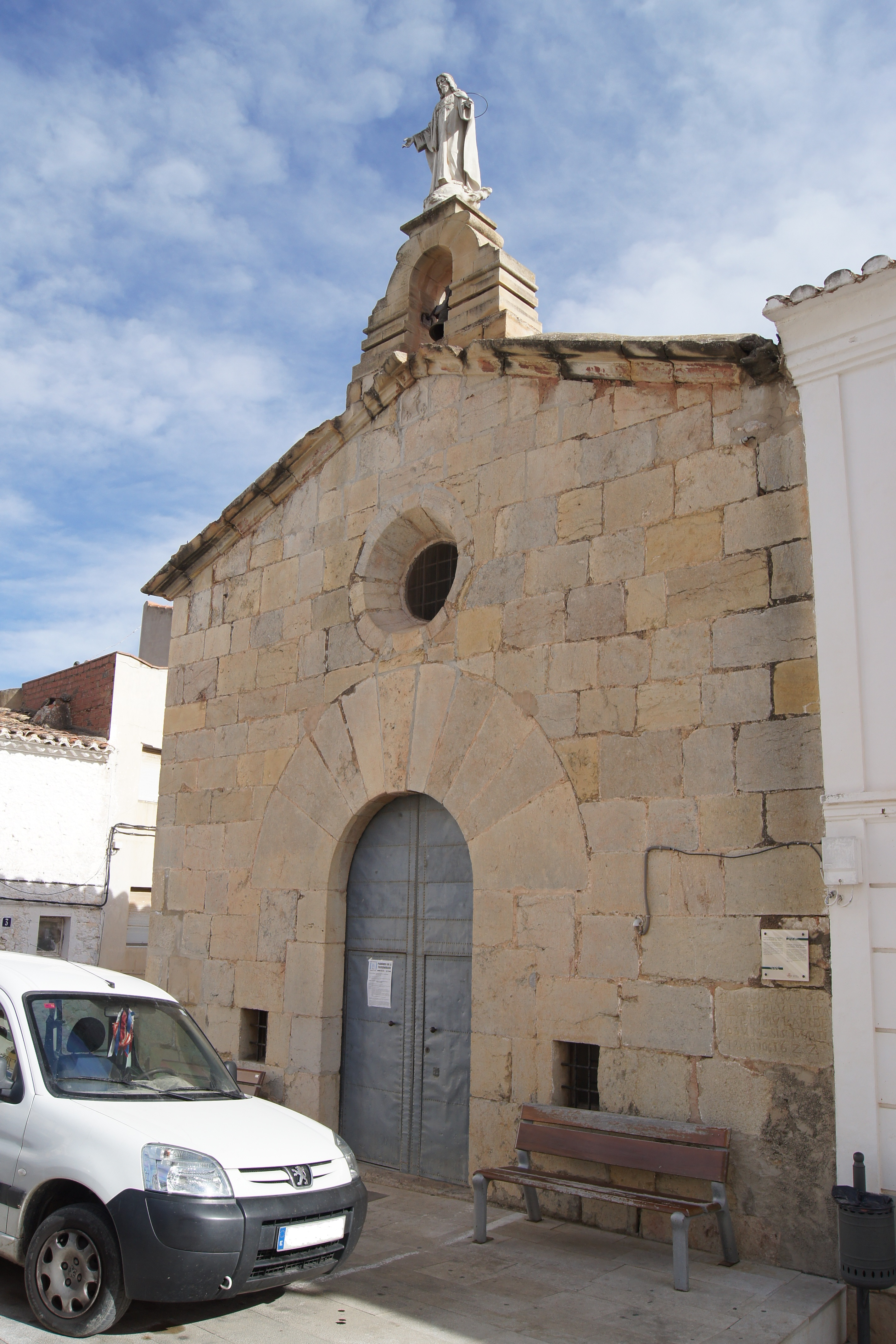 Ermita del Cristo. Les Useres, Castellón. España